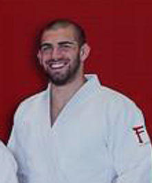 Photo de Toma Nikiforov sur la banderole des judokas de la Fédération Francophone Belge de Judo